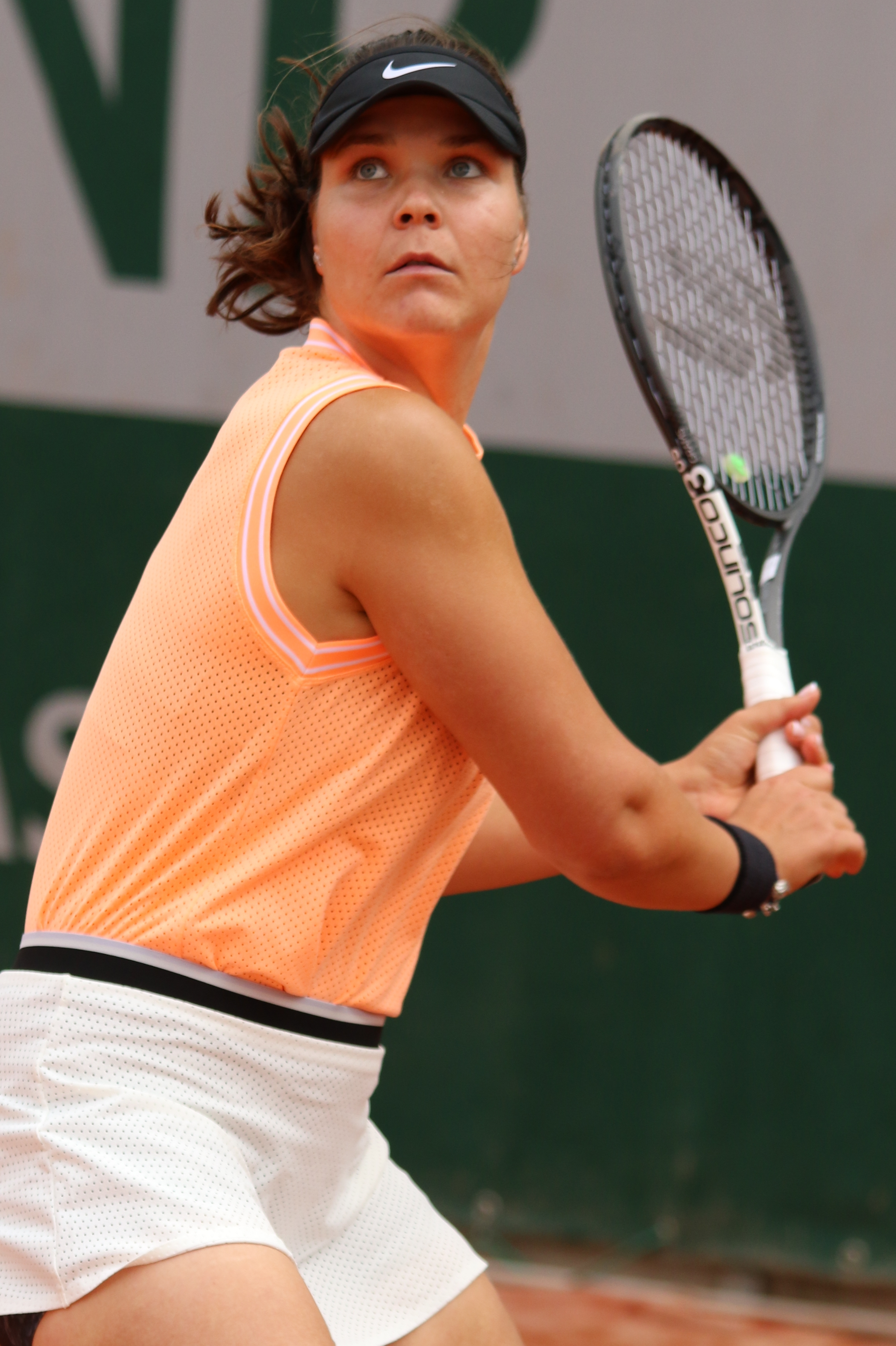 Marozava RG19 (40)